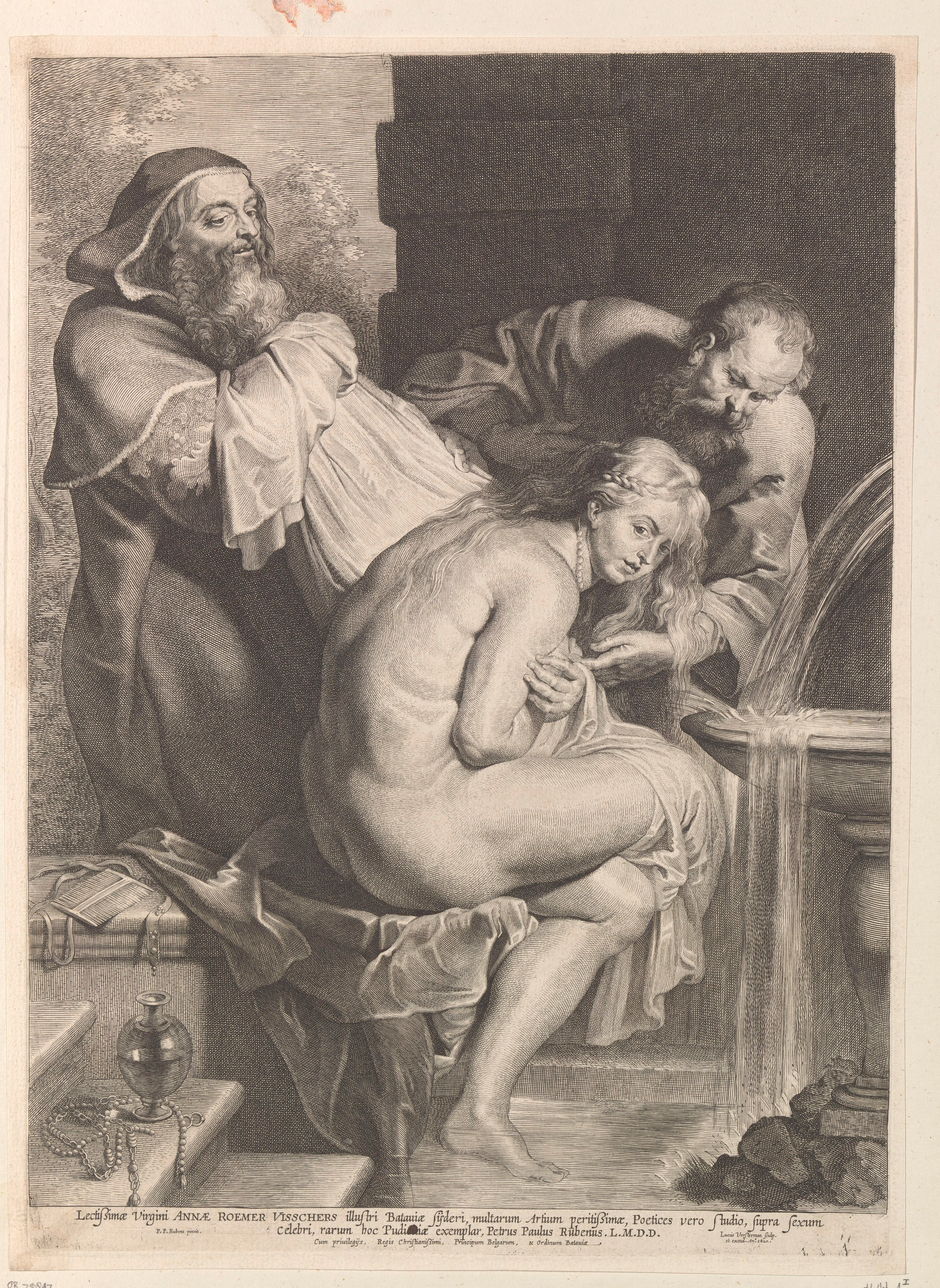 IdentificatieTitel(s): Suzanna en de ouderlingenObjecttype: prent Objectnummer: RP-P-OB-75.847Catalogusreferentie: Hollstein Dutch 4-1(2)VervaardigingVervaardiger: prentmaker: Lucas Vorsterman (I) (vermeld op object)naar schilderij van: Peter Paul Rubens (vermeld op object)uitgever: Lucas Vorsterman (I) (vermeld op object)verlener van privilege: onbekend (vermeld op object)Plaats vervaardiging: Zuidelijke NederlandenDatering: 1620Fysieke kenmerken: gravureMateriaal: papier Techniek: graveren (drukprocedé)Afmetingen: plaatrand: h 387 mm × b 277 mmOnderwerpWat: the elders making advances towards SusannaVerwerving en rechtenVerwerving: onbekendCopyright: Publiek domein